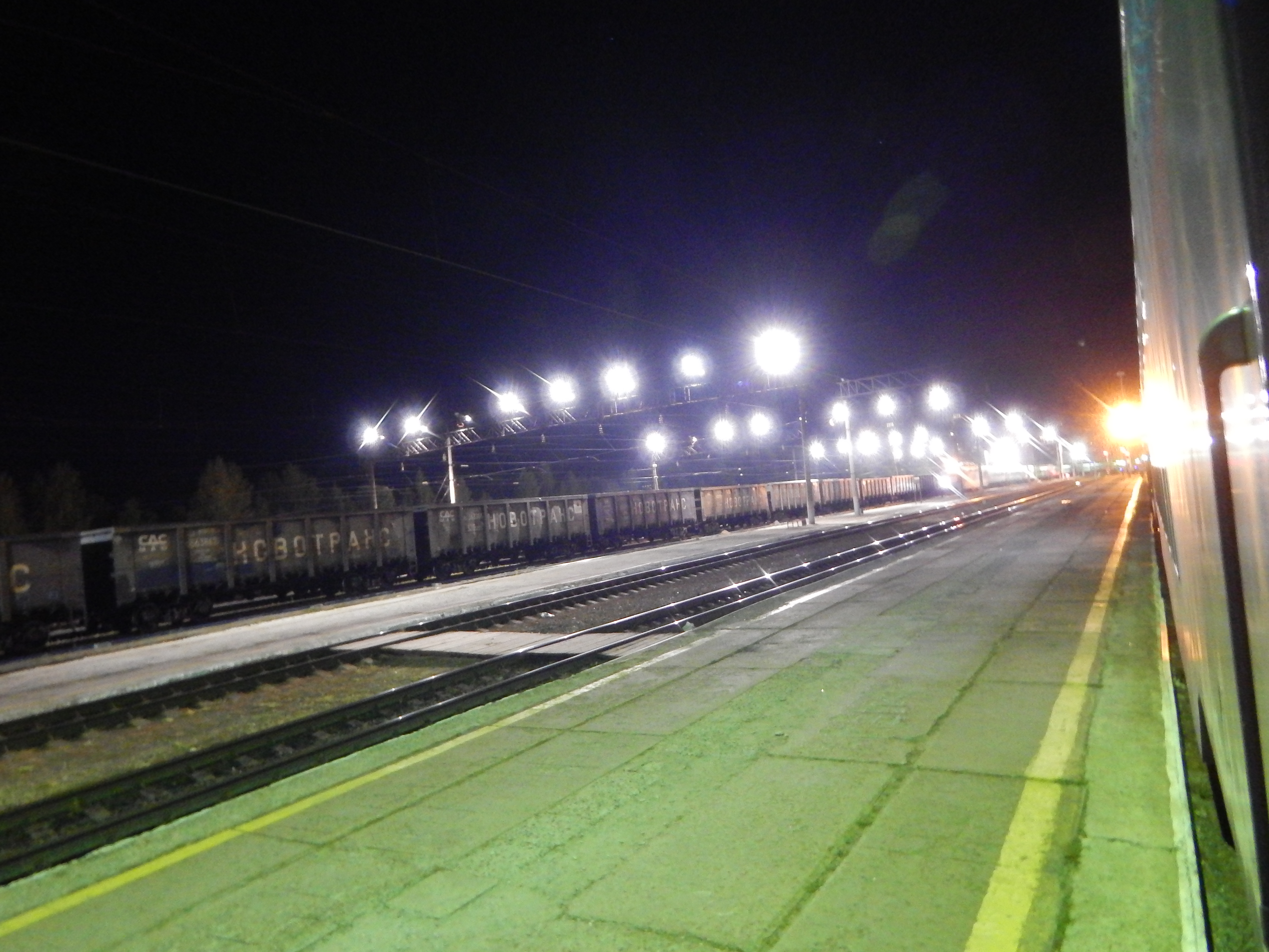 Станция Вековка ночью, съёмка из вагона двухэтажного поезда Казань - Москва